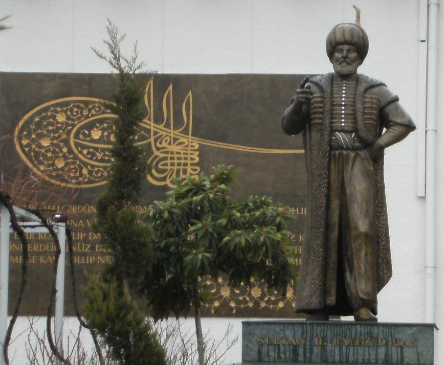 I. Bayezid heykeli Ankara TSE binasının bahçesinde bulunmaktadır